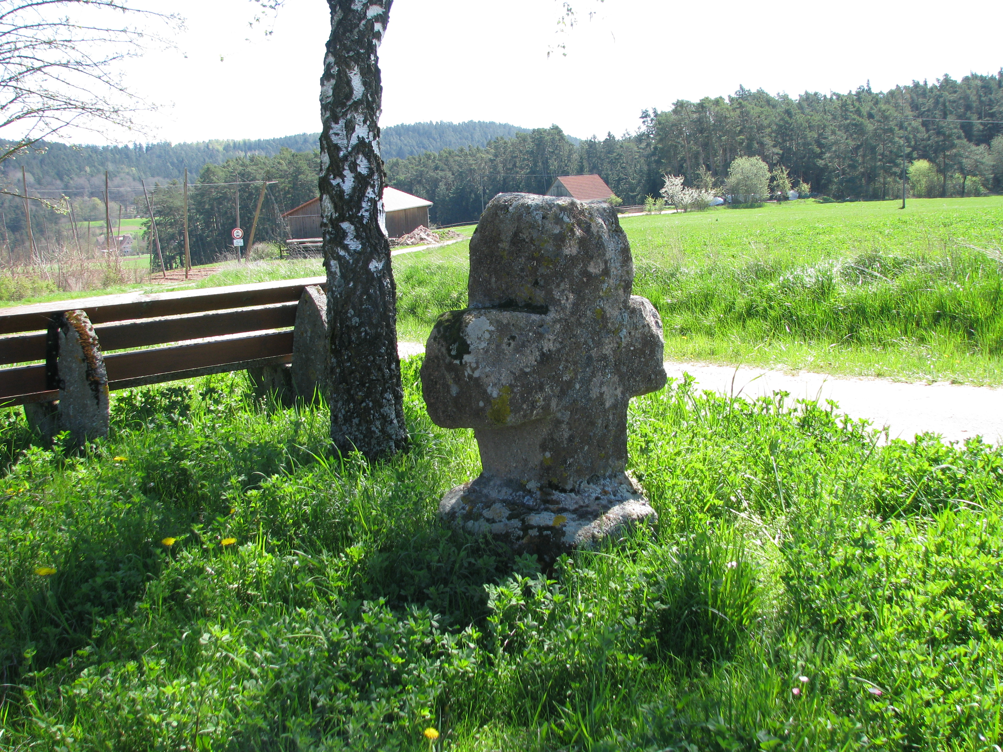 Schwedenkreuz bei Ottmannsberg (Ortsteil von Spalt im mittelfränkischen Landkreis Roth)